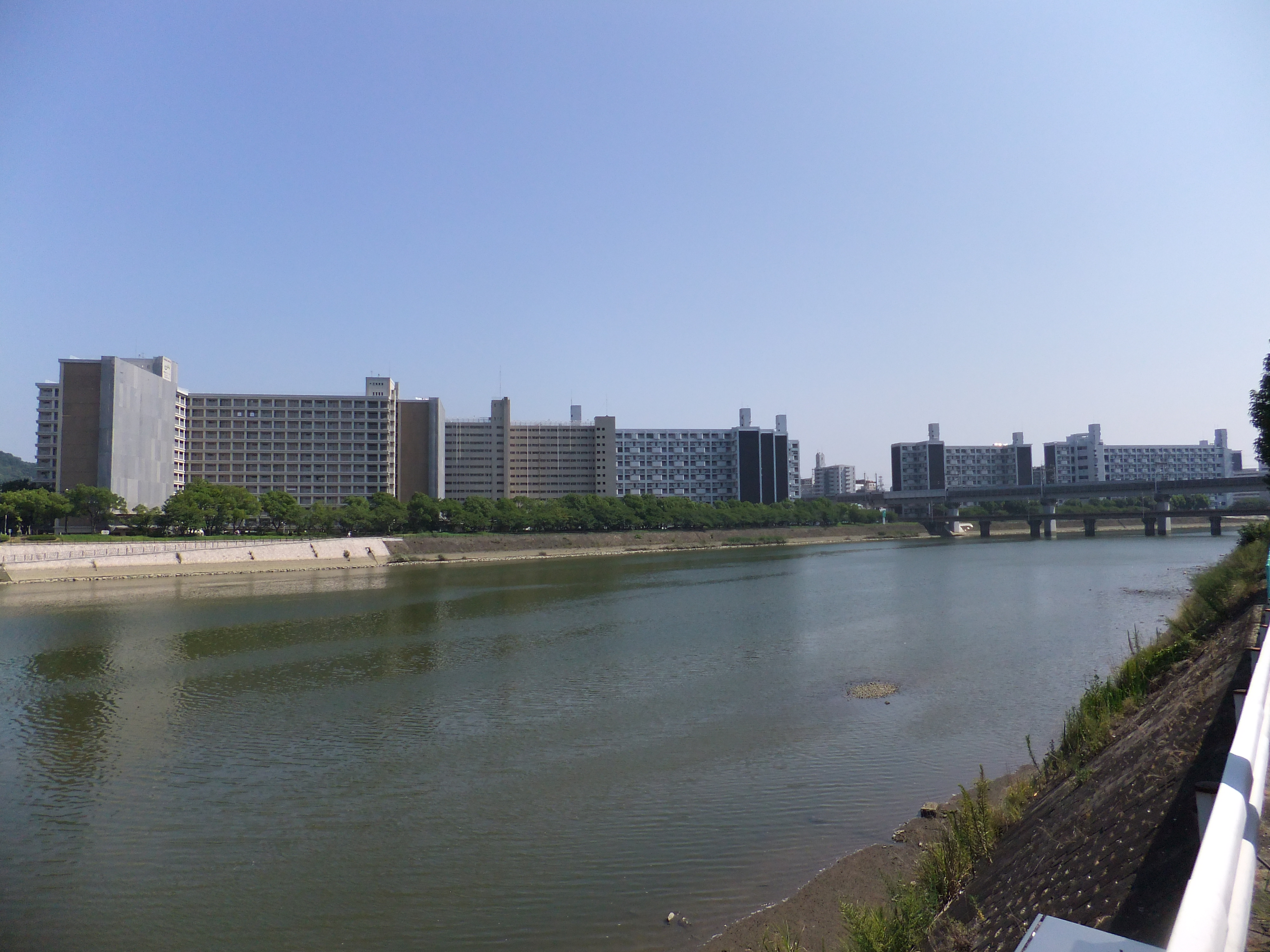 県営長寿園アパート